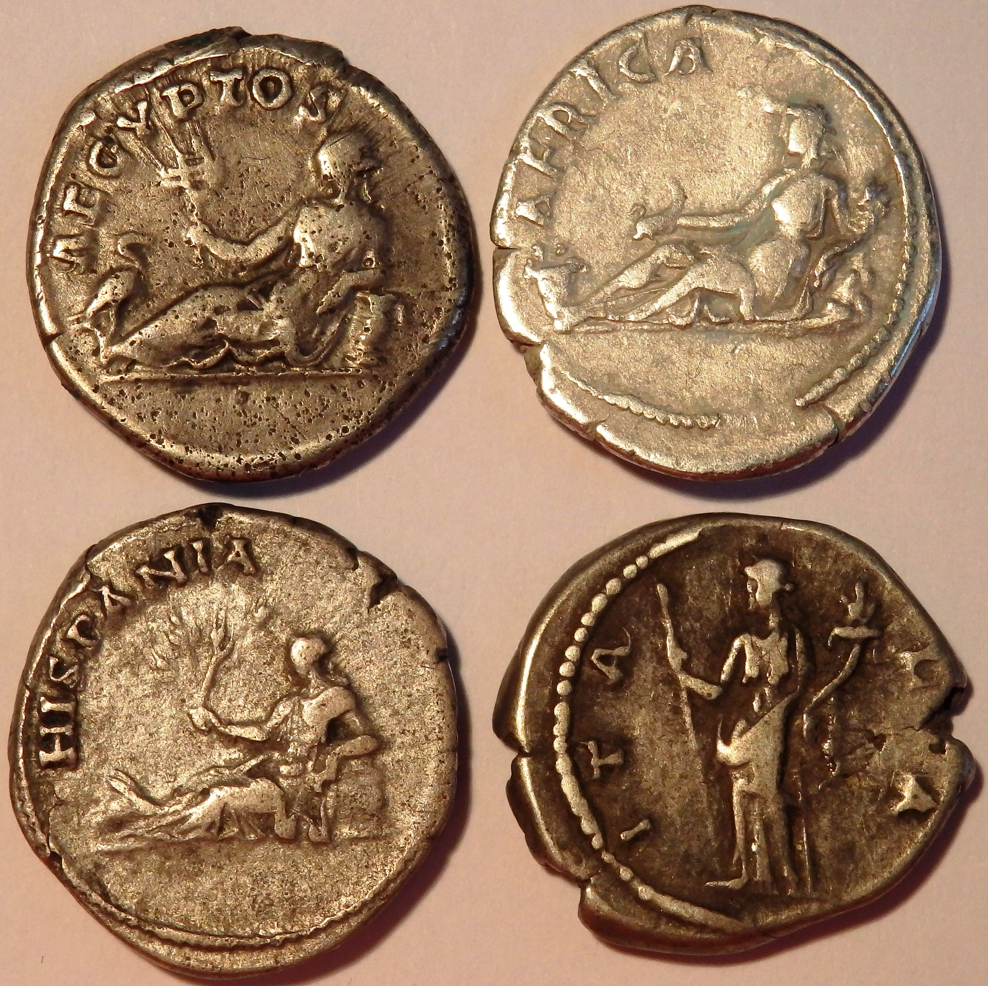 Auswahl allegorischer Provinzdarstellungen anläßlich der Reisen Hadrians (Aegyptos, Africa, Hispania, Italia) auf Denaren seiner Zeit, Kampmann 32.43,75,72,74